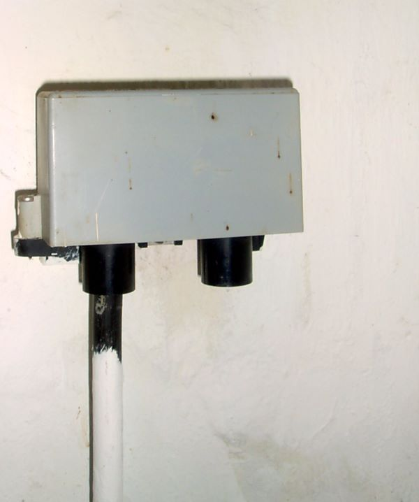 HÜP Hausübergabepunkt (Kabelanschluss), Bj. 1986